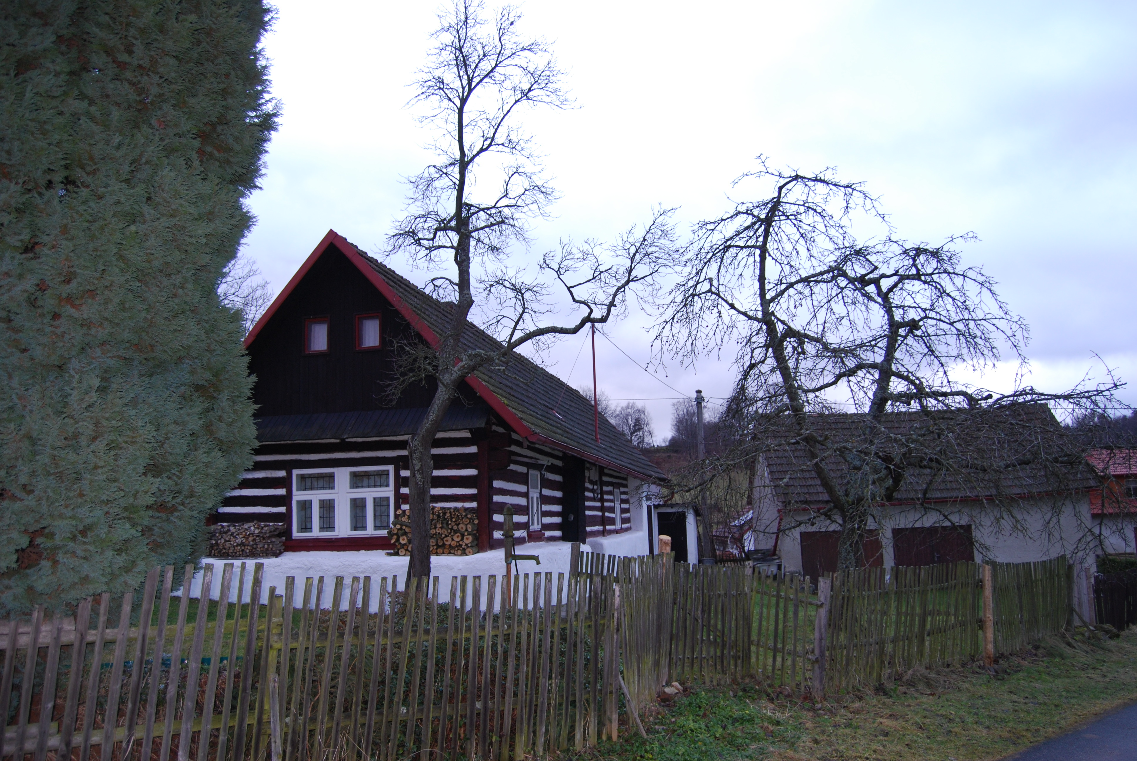 Stavení ve vesnici. Radešice je část obce Petrovice v okrese Příbram. Česká republika.